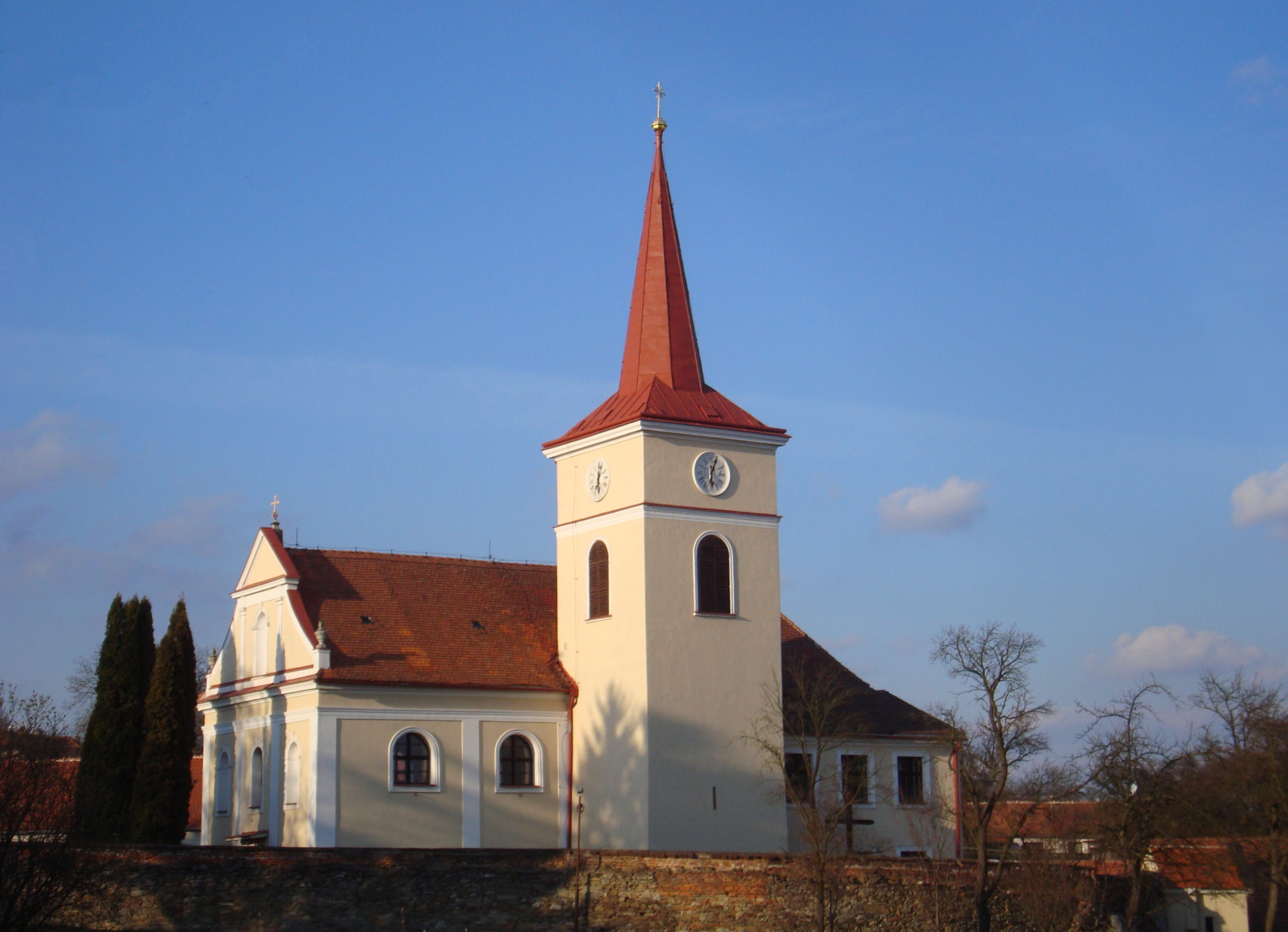 Domašov (Brno-venkov), farní kostel sv. Vavřince